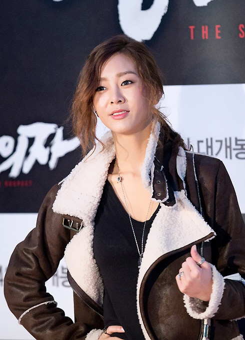 131217-용의자-VIP시사회지나